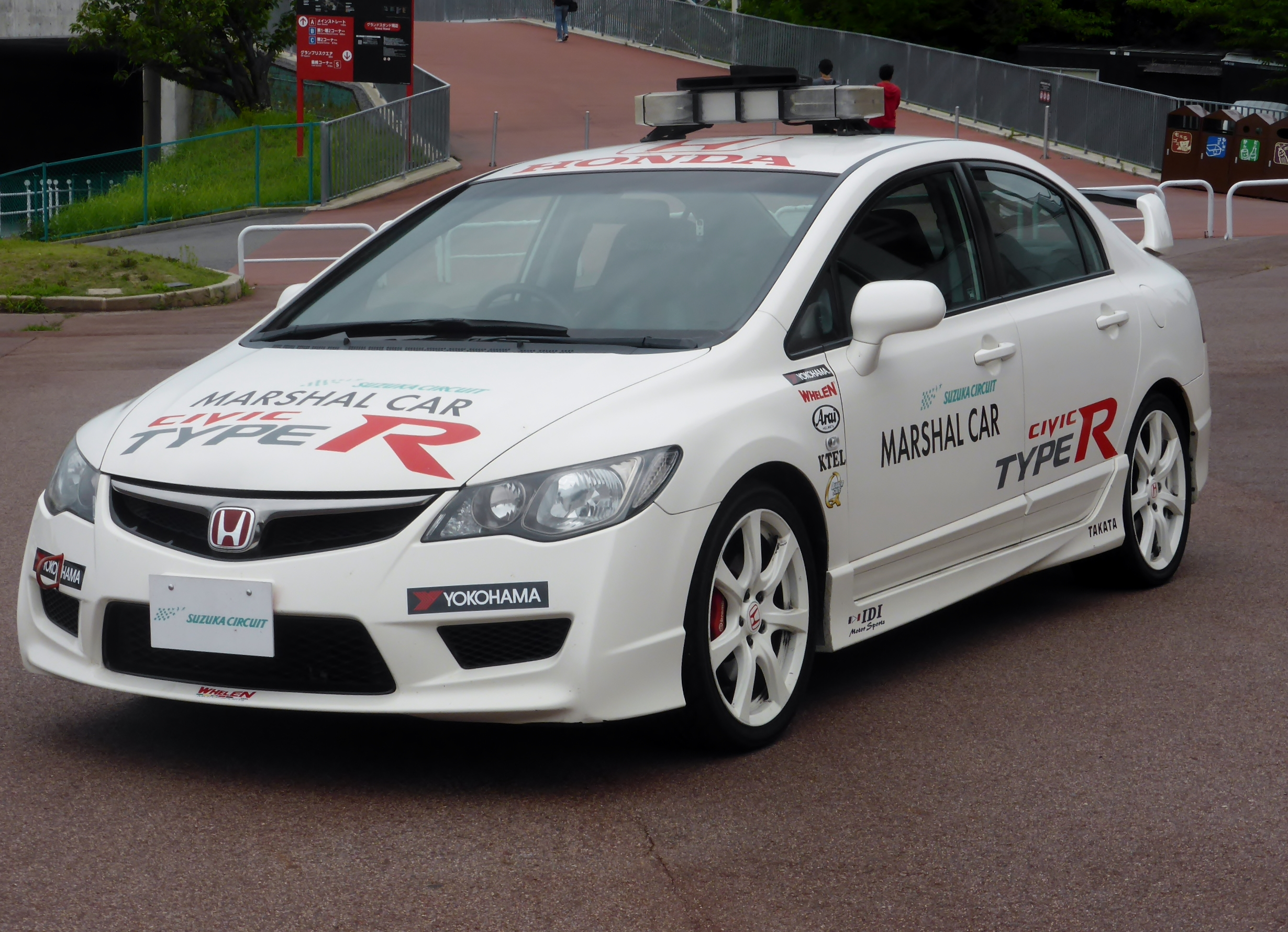 FD2型ホンダ・シビックタイプRの鈴鹿サーキットマーシャルカー仕様をフロントから撮影。